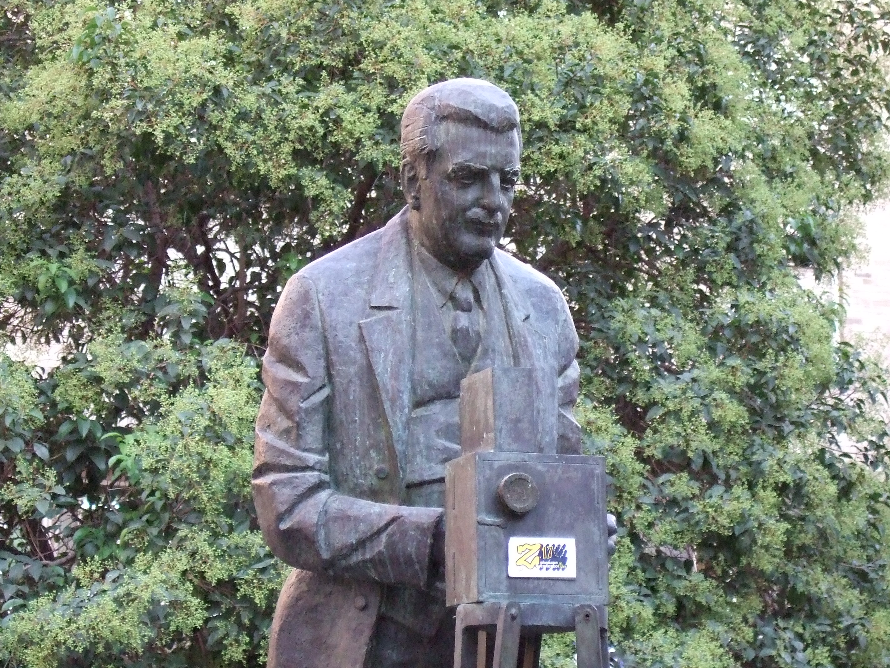 Zaragoza - Estatua de Eduardo Jimeno Correas - Inscripción: "Al zaragozano Eduardo Jimeno Correas (1870-1947) - I pionero del cine español"